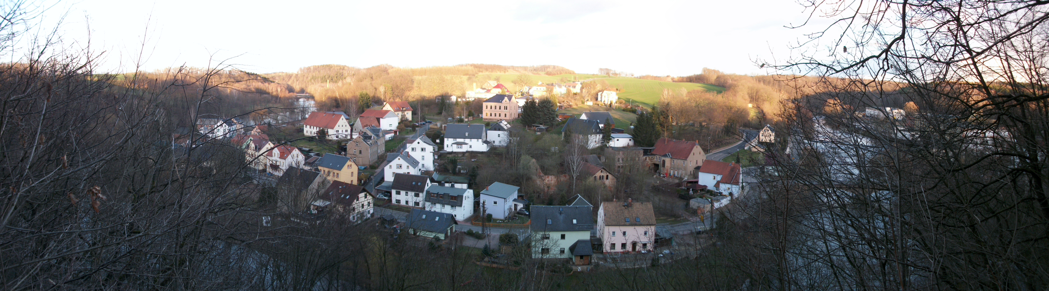 Neudörfchen (Mittweida), Panorama